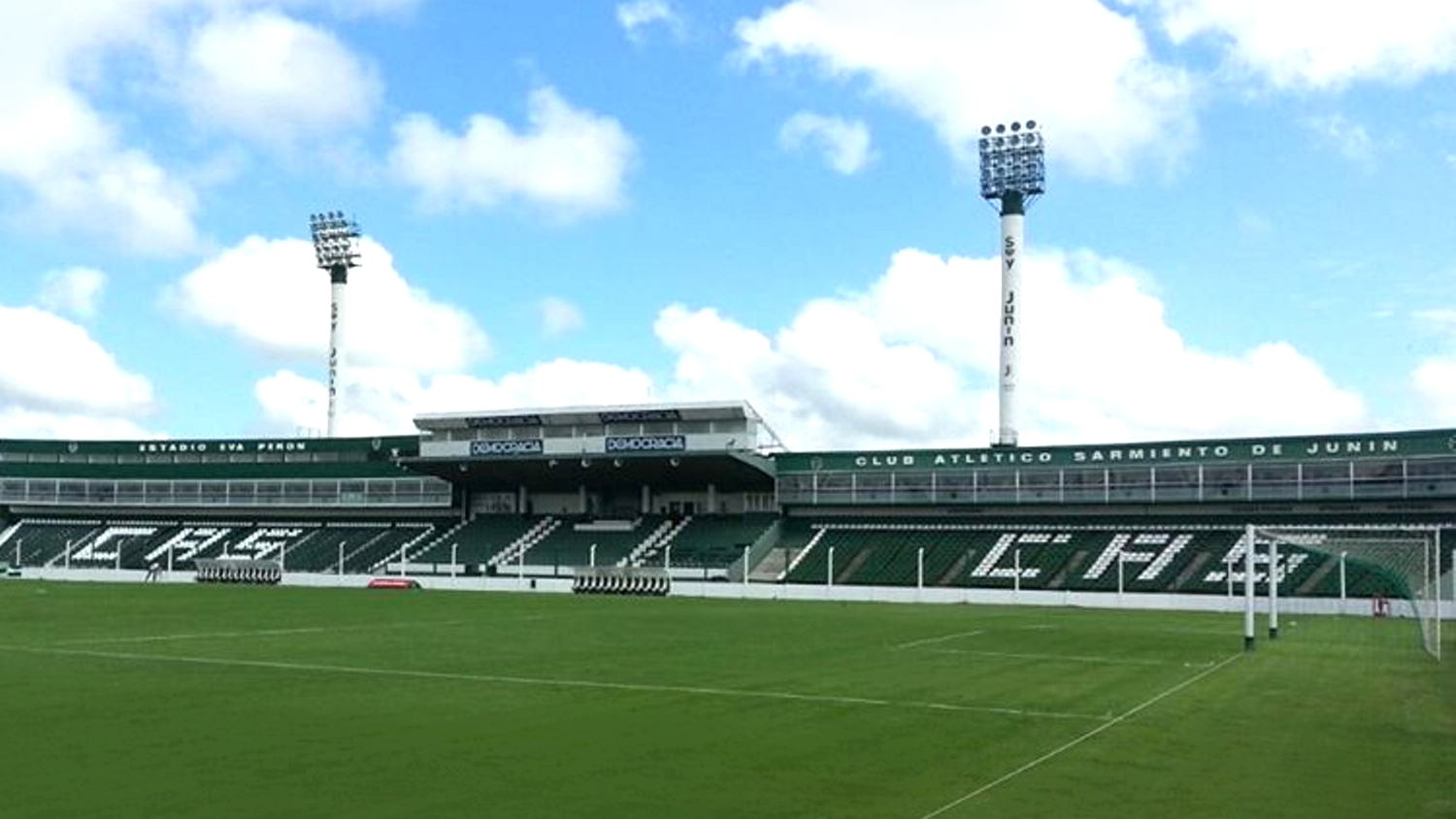 Estadio Eva Perón del Club Atlético Sarmiento. Junín, Argentina. Sector íntegramente de plateas de la calle Necochea. Al centro, platea cubierta; a ambos lados, plateas descubiertas; sobre éstas, los palcos. Sobre los palcos del lado izquierdo, las cabinas de transmisión.